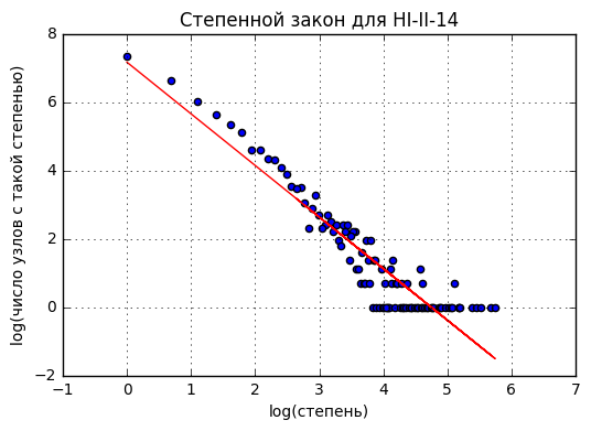 log-log график распределения степеней для человеческого интерактома версии HI-II-14. Данные были собраны в рамках проекта Human Reference Protein Interactome Project ( я не являюсь участником этого проекта, я только построил этот график на основе открытых данных из свободно доступных в Интернете.